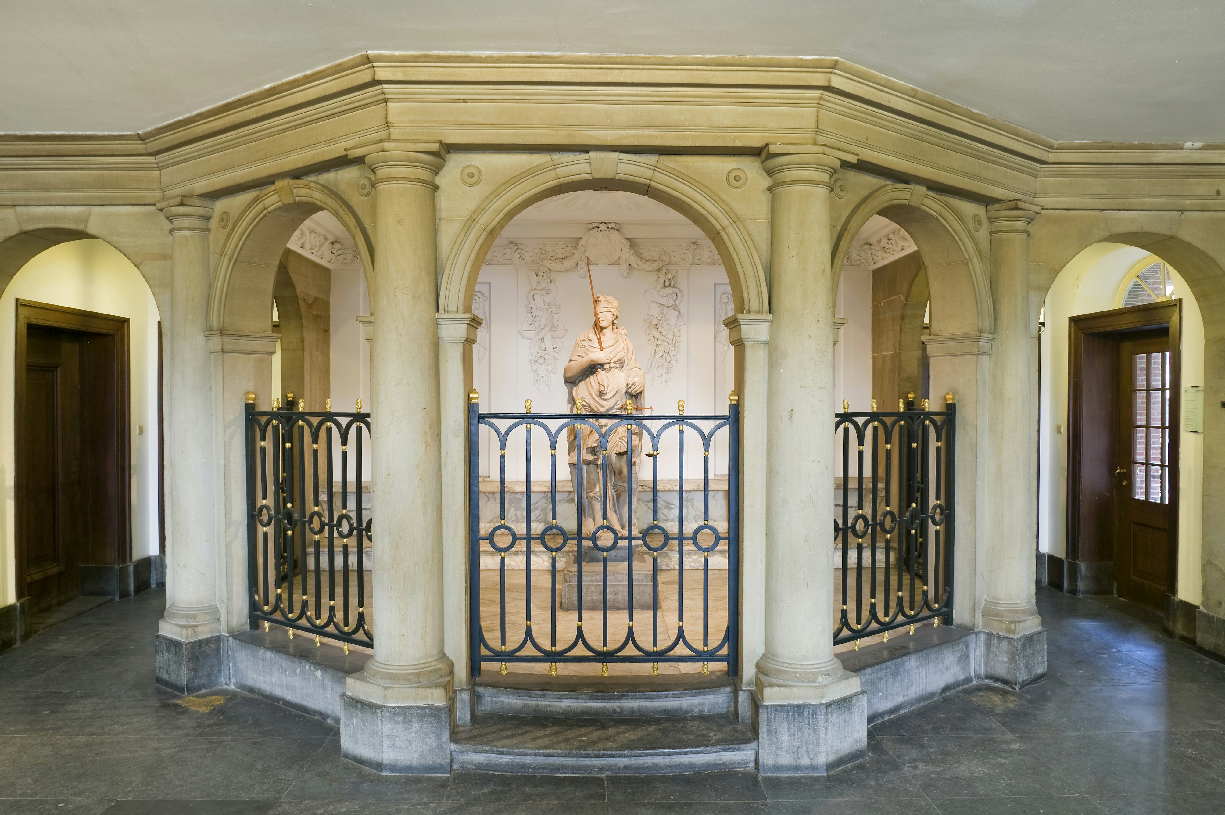 raadhuis - stadhuis: Interieur, vierschaar in het voorhuis